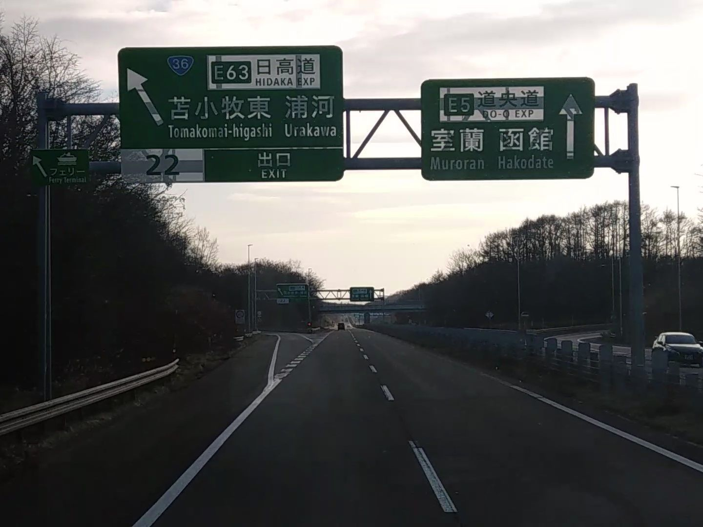 苫小牧東インターチェンジ・分岐部-1・方面及び出口（112-A）と方面及び方向（108の2-D）（札幌側から、2018年12月撮影）逆光対策として白色部分にパンチングメタルのスリットを使用している